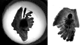 Paire d'otolithes appartenant au même turbot. Les images ne sont peut-etre pas à l'échelle, mais l'on perçoit vite l'asymétrie. Photos prises par Matthieu Godbout, automne 2006.